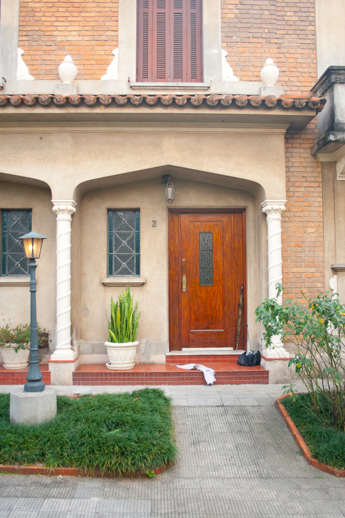 Casa 453-2 no Parque Residencial Savóia, em São Paulo (SP)